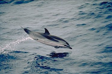 Blau-Weißer Delfin